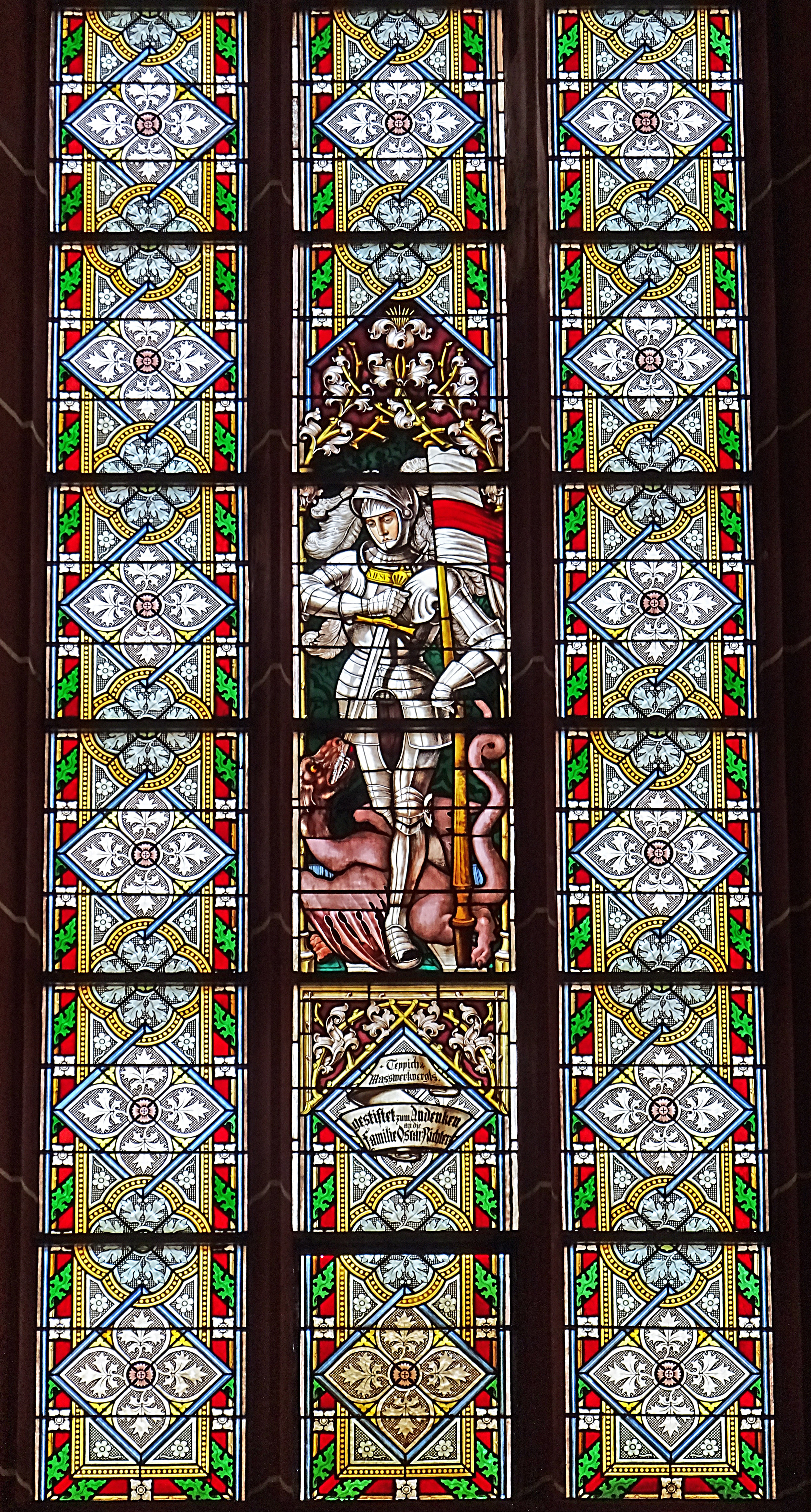 Georg besiegt das Böse, Buntglasfenster in der Johanneskirche Saalfeld